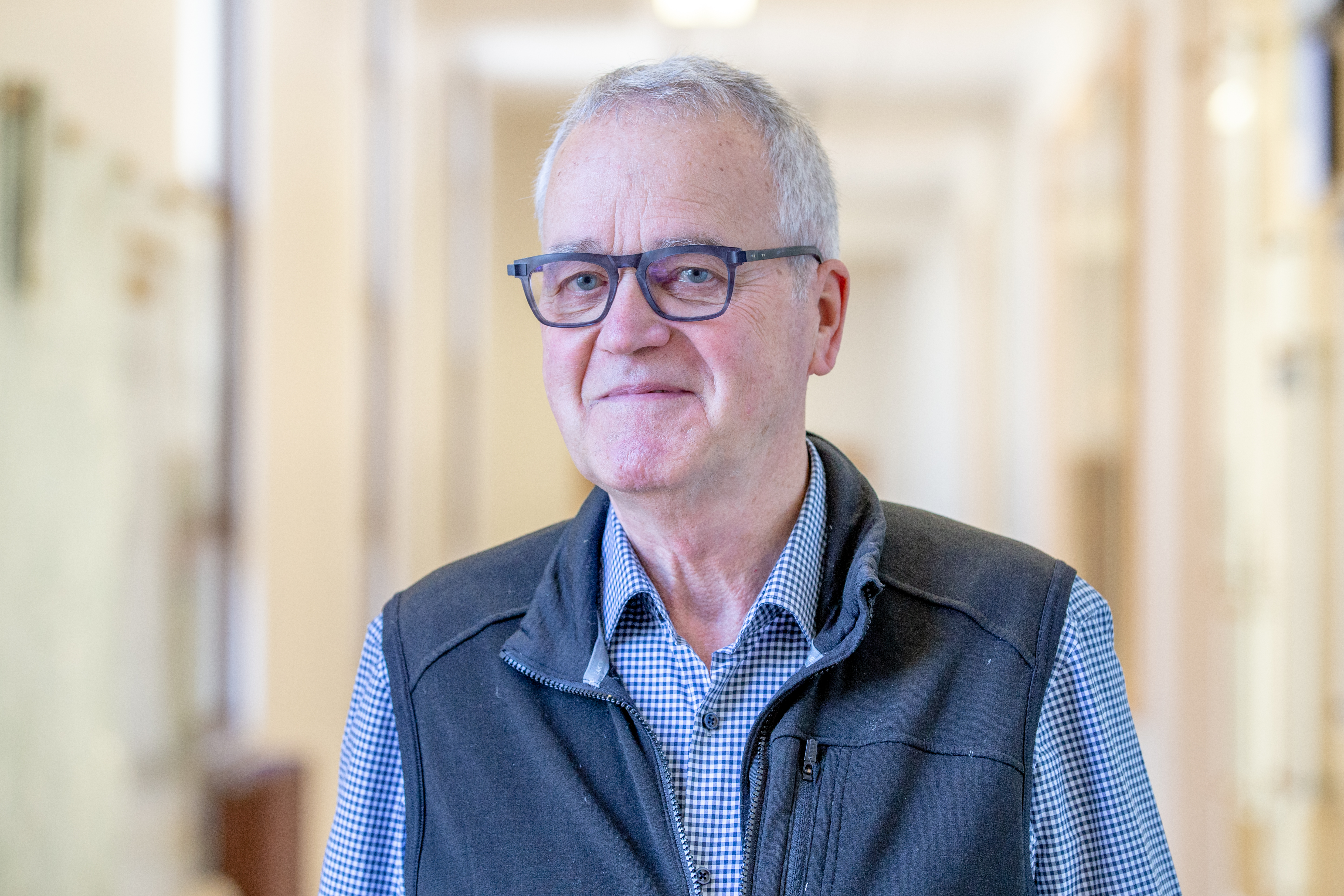 Portrait de Anthony Moffat, astronome et professeur émérite d'astronomie à l'Université de Montréal.